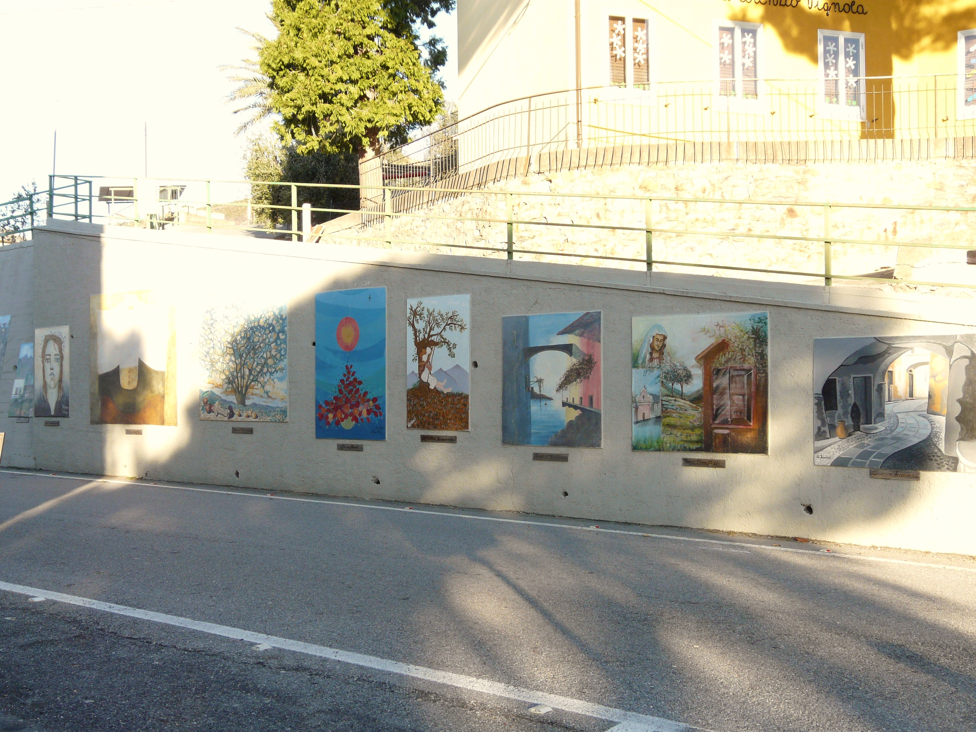 Murales di Arnasco, Liguria, Italia